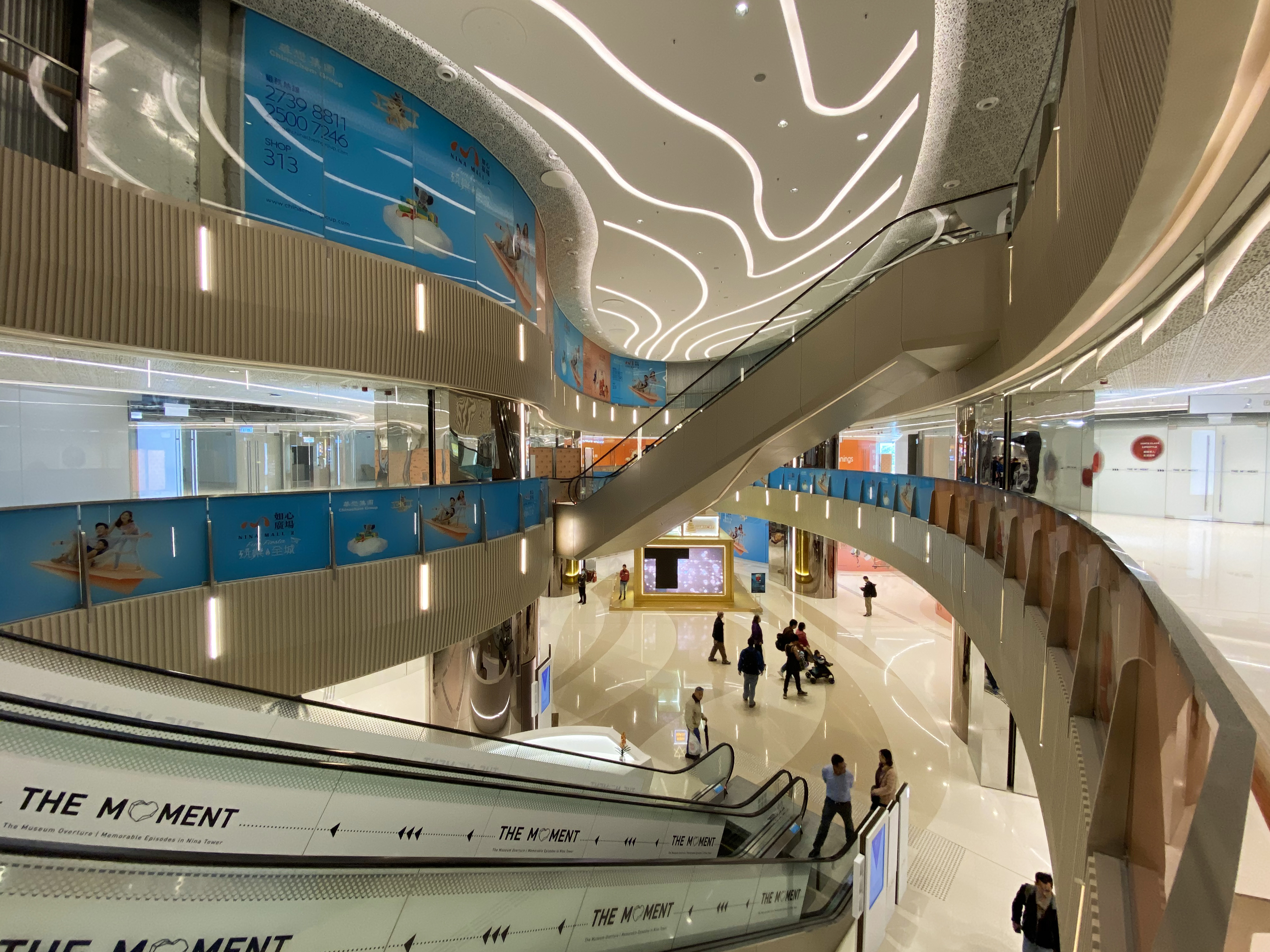 Nina Mall Atrium